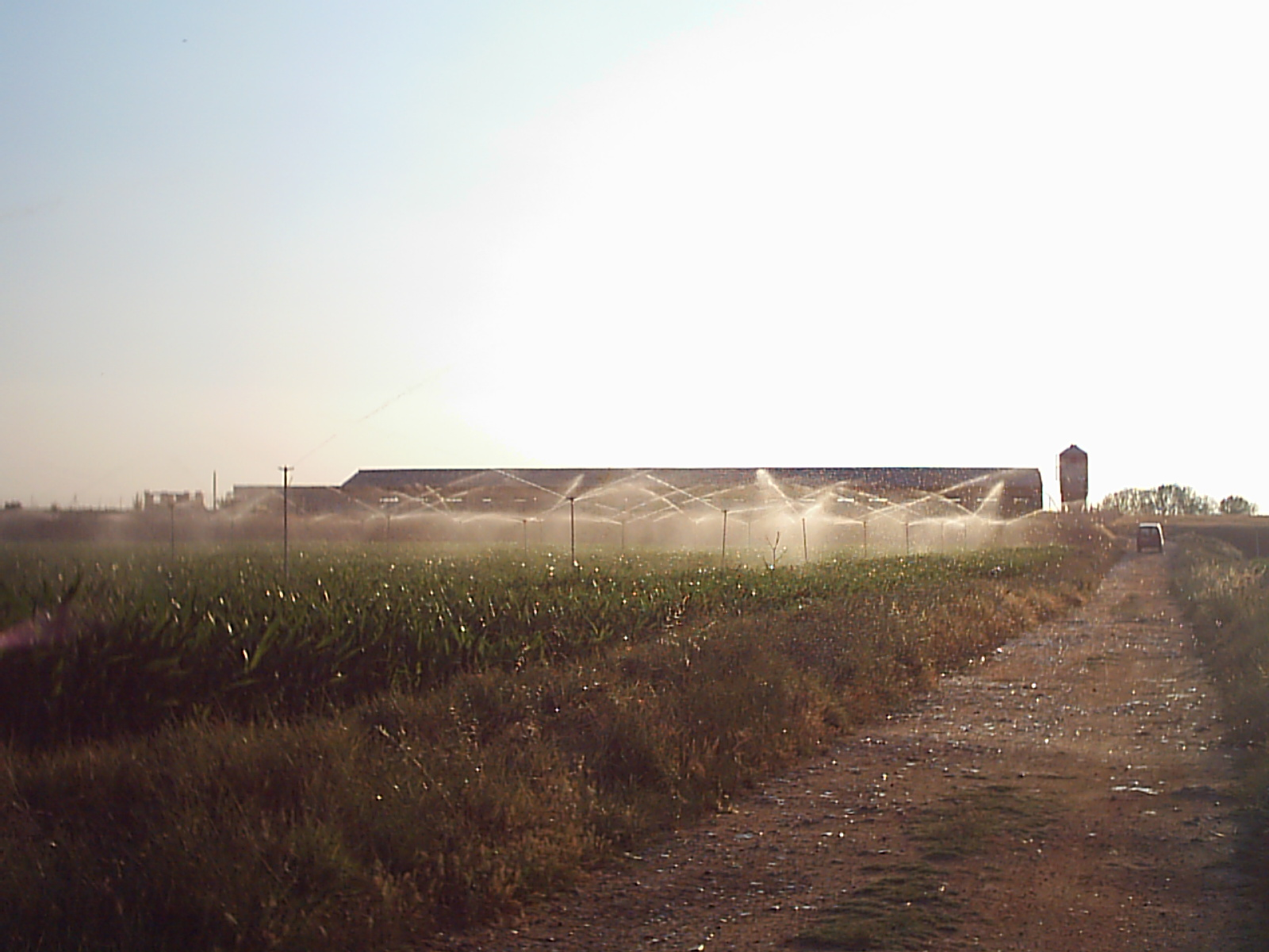 Riego de una finca de maíz en el paraje de Los Majacanes, en el regadío de San Frontis, en el T. M. de Morales del Vino. El campo ha sido tradicionalmente un pilar fundamental de la economía de numerosas familias en Morales, aunque el declive actual está reduciendo el número de explotaciones agropecuarias. La modernización del regadío recientemente en los términos de Morales, Arcenillas y Zamora ha posibilitado un importante ahorro de agua así como la mejora de la productividad de las fincas, si bien supone la necesidad de adecuar la mecanización a nuevos sistemas de riego. Las condiciones climáticas de la Meseta de Castilla y León hacen que sea necesario el riego frecuente de cultivos como el maíz, la remolacha, la patata,... para tener producciones satisfactorias.